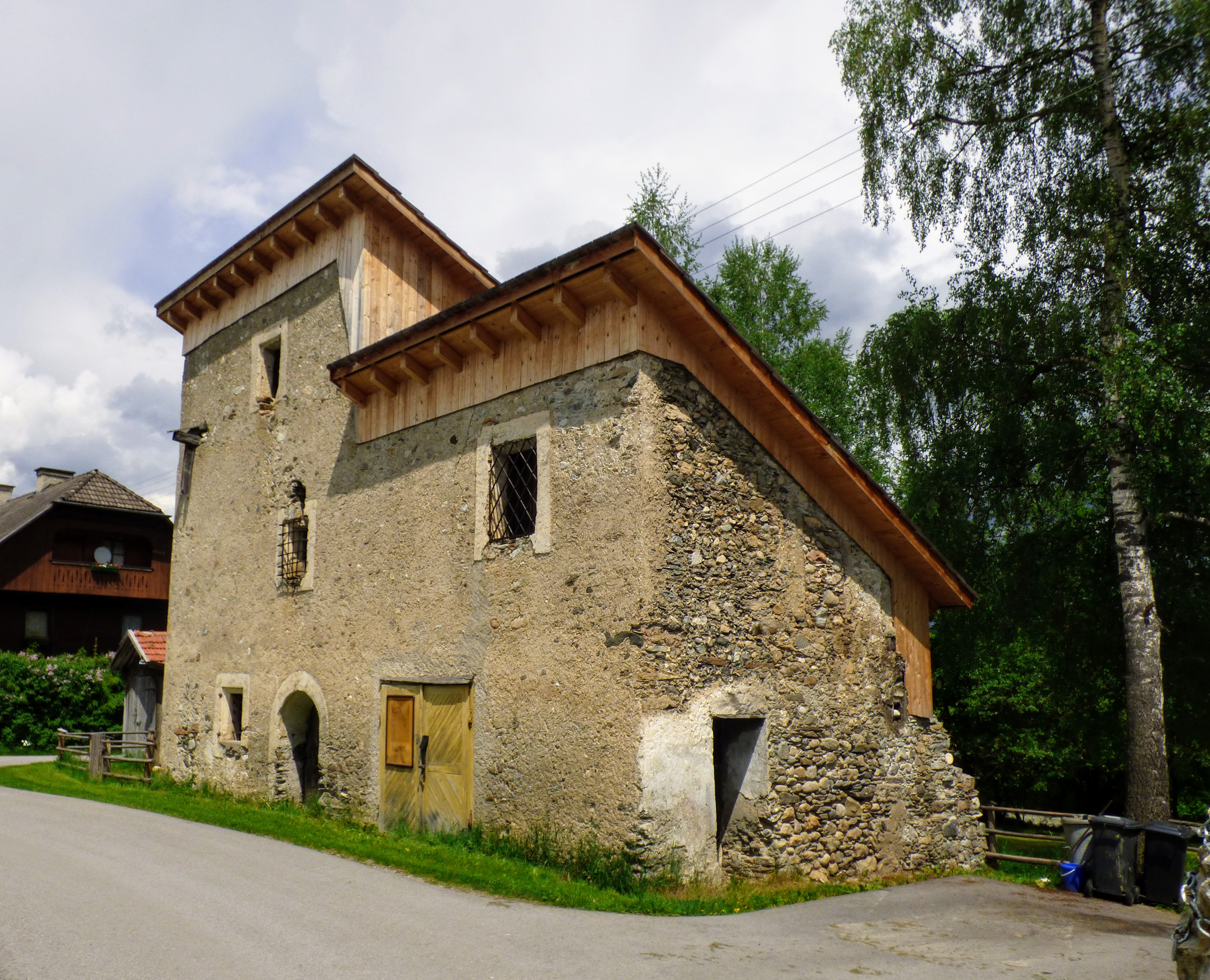 Ansitz Gröbendorf (Gde. Mariapfarr) Object location47° 08′ 10.81″ N, 13° 43′ 18.97″ E